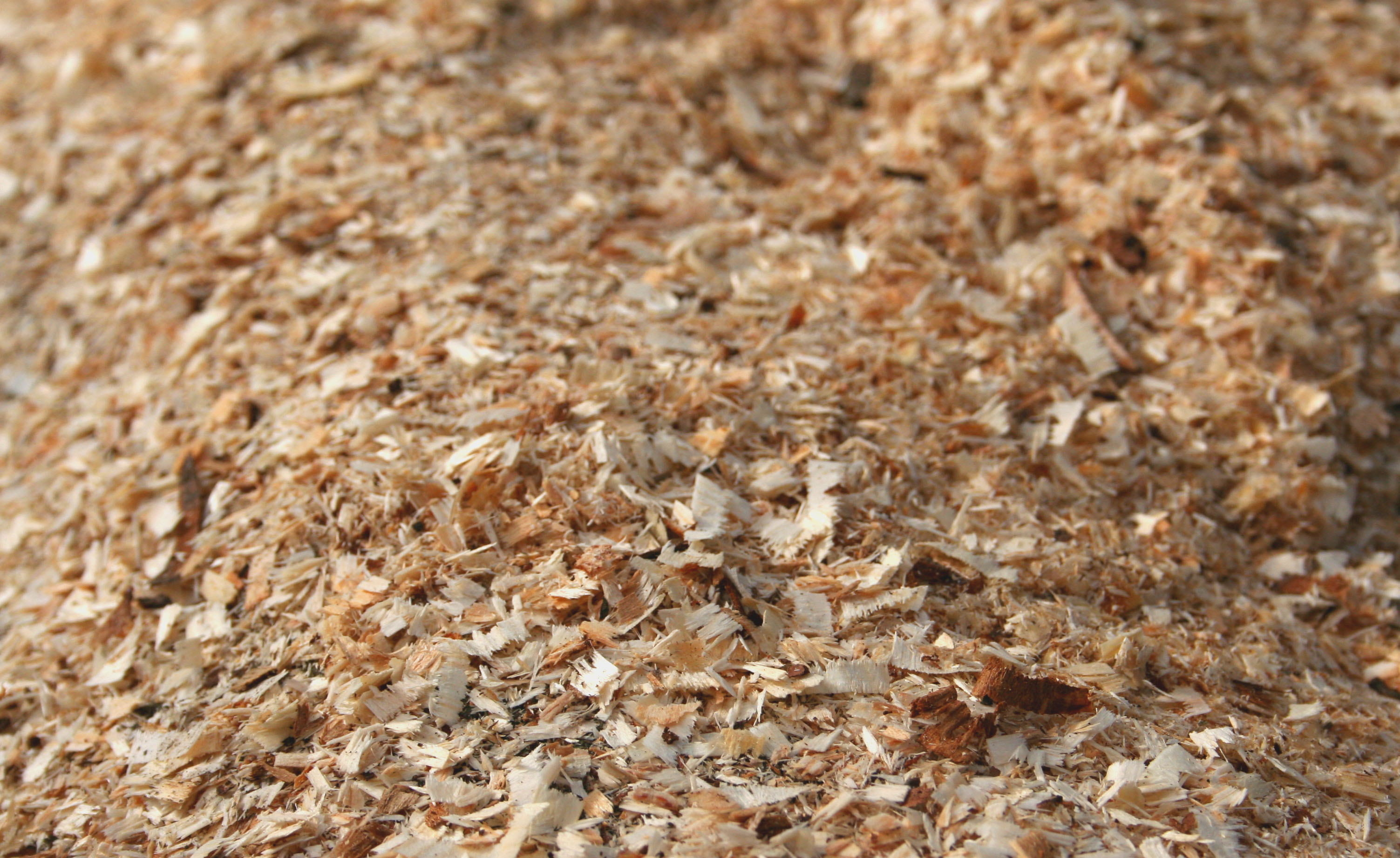 trociny